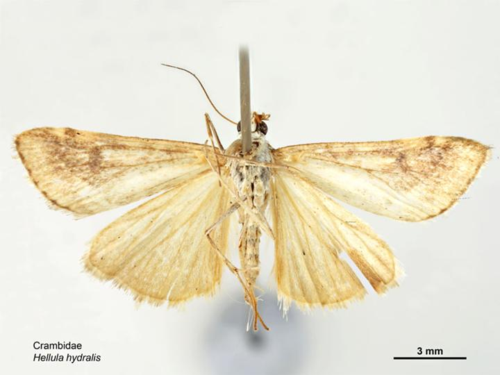 Hellula hydralis ventral view